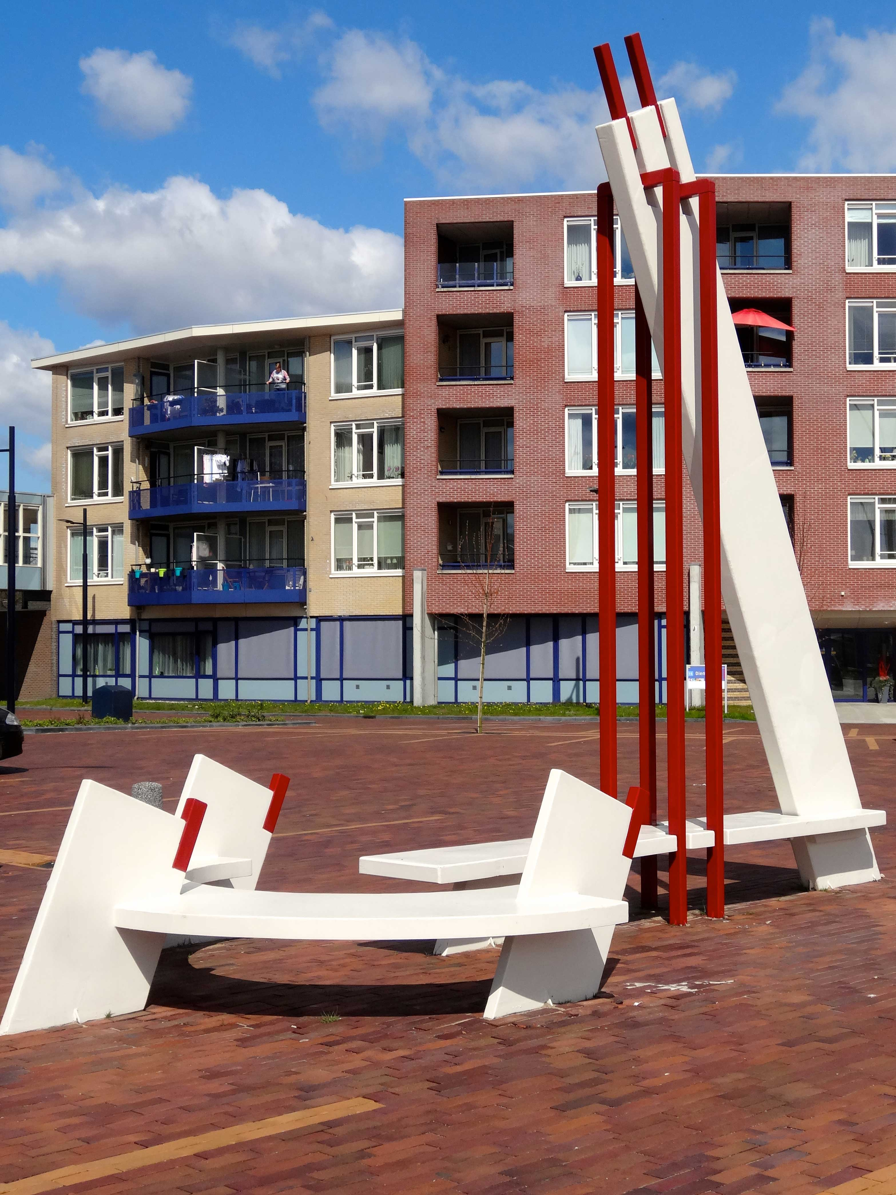 Bankbeeld door Chris Verbeek op het Willem Diemerplein in Musselkanaal